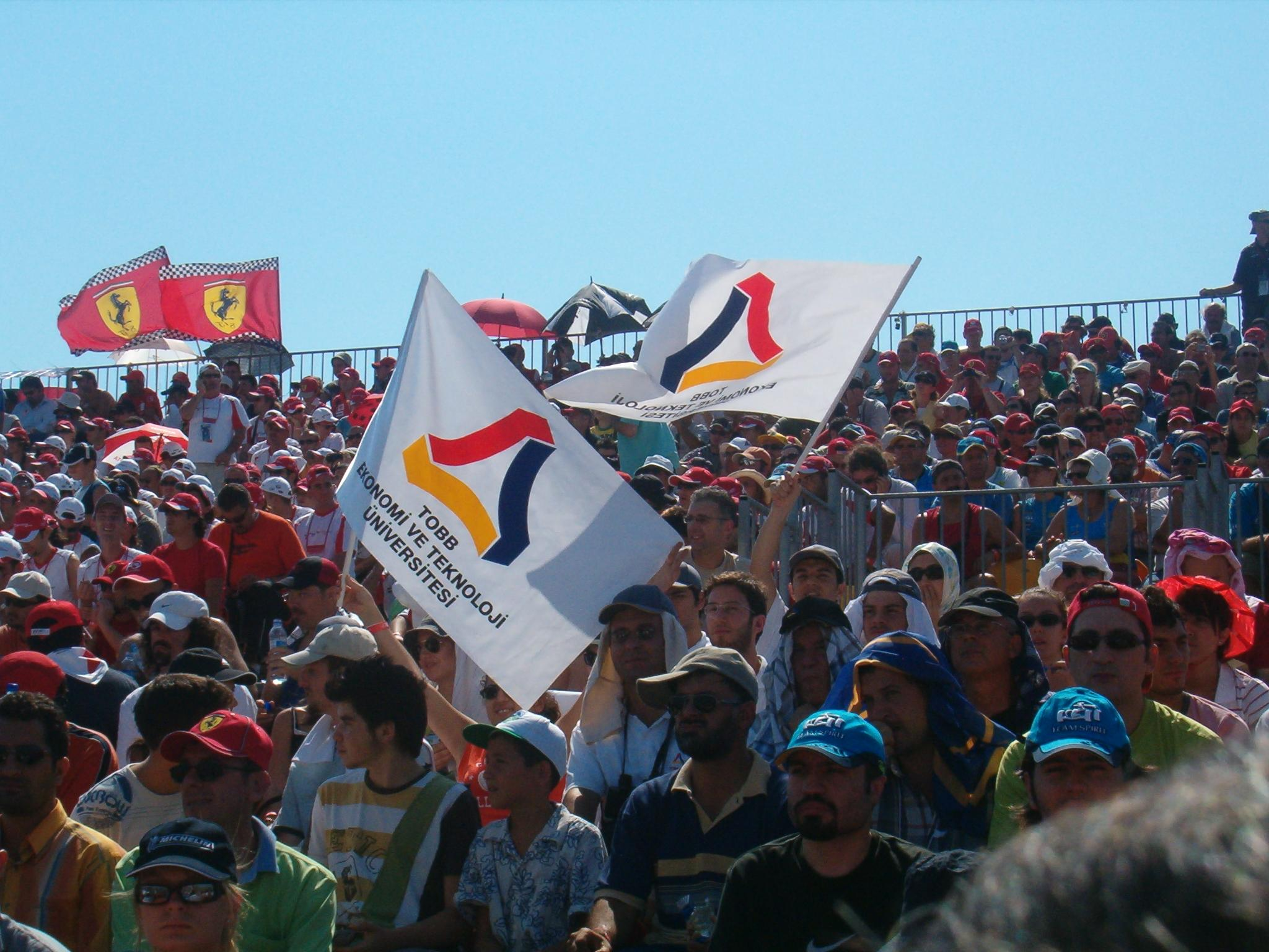 TOBB ETÜ Motor Sporları Topluluğu organizesinde öğrenciler Formula-1 yarışlarında İstanbul Park'ta.